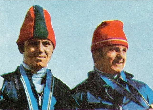 CAMPIONI dello SPORT 1973/74-Figurina n.355- ZIMMERER+UTZSCHNEIDER - BOB -Rec